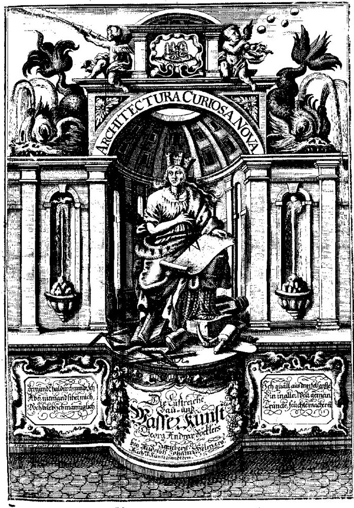 Frontespizio